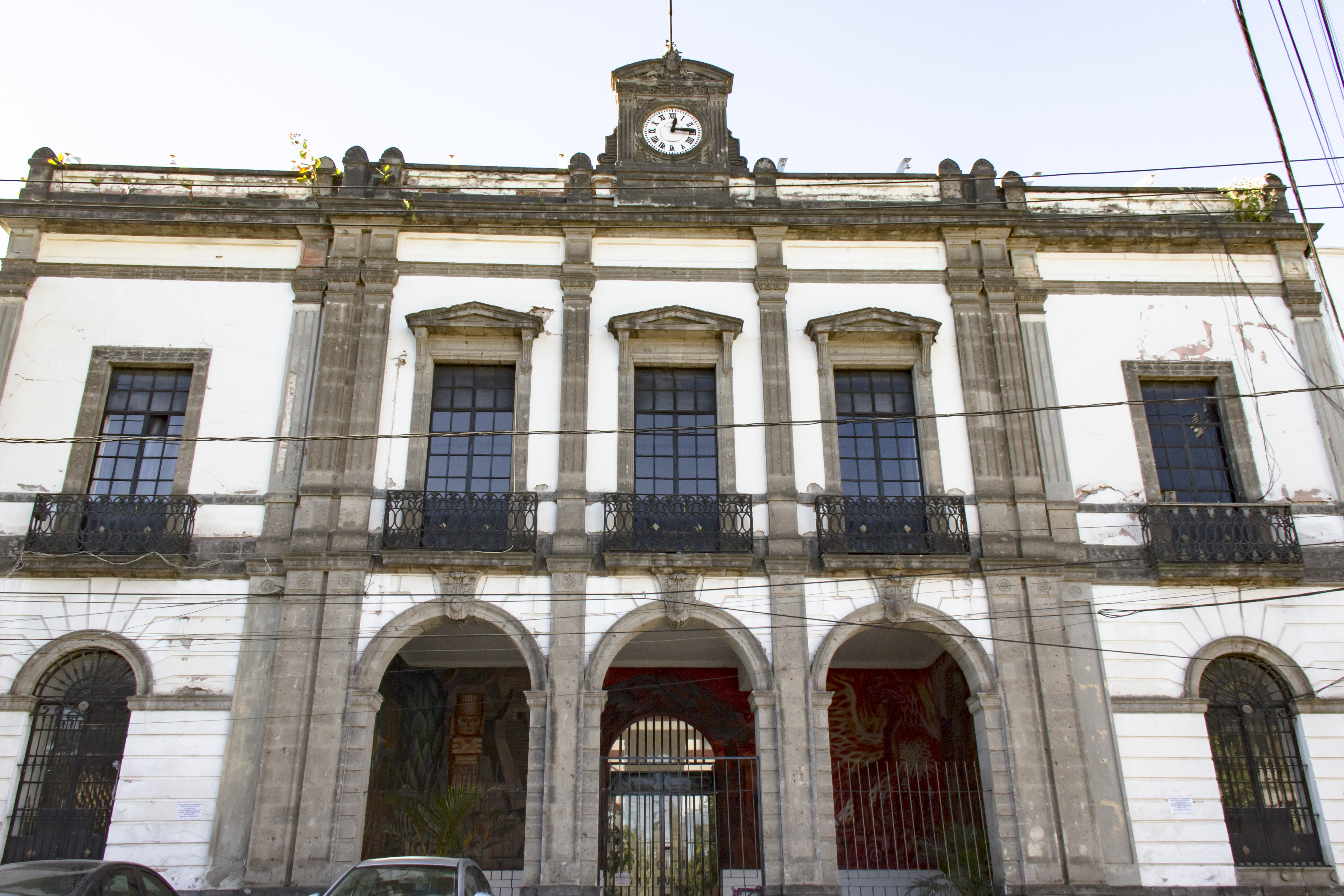 Casa de la Cultura "Juan Rulfo"